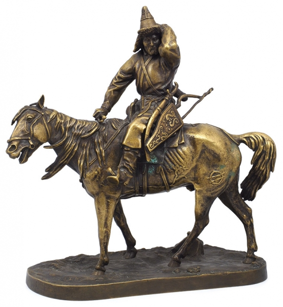 Скульптура «Башкир. Ветрено!». Автор Е.А. Лансере. Россия, Санкт-Петербург, Фабрика художественной бронзы Ф.Ю. Шопена. 1886–1893.